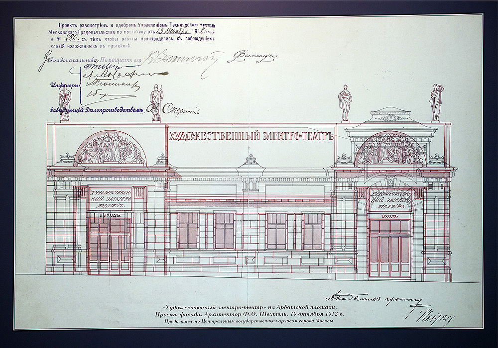 Изображение фасада кинотеатра "Художественный", рисунок/чертеж выполнен на бумаге, является частью проектной документации, выпущенной с целью осуществить перестройку здания.